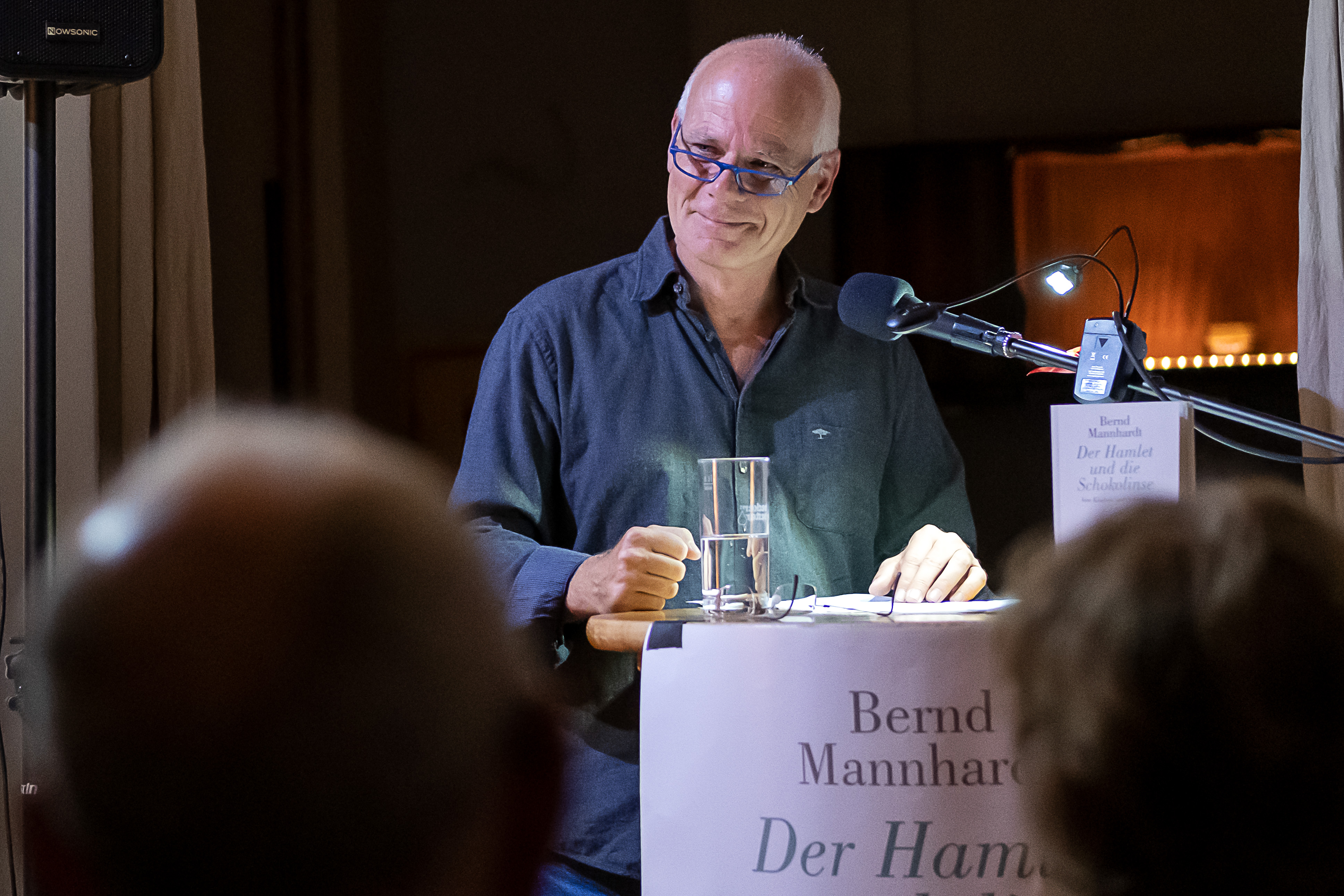 Bernd Mannhardt auf der Buchpremiere "Der Hamlet und die Schokolinse. Vom Kindsein und Schreiben", 2019, Berlin-Neukölln